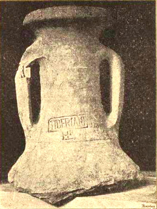 Camille Jullian, Fouilles dans le quartier Saint-Seurin ː col d'amphore avec marque de fabrique à la croix, 1897.